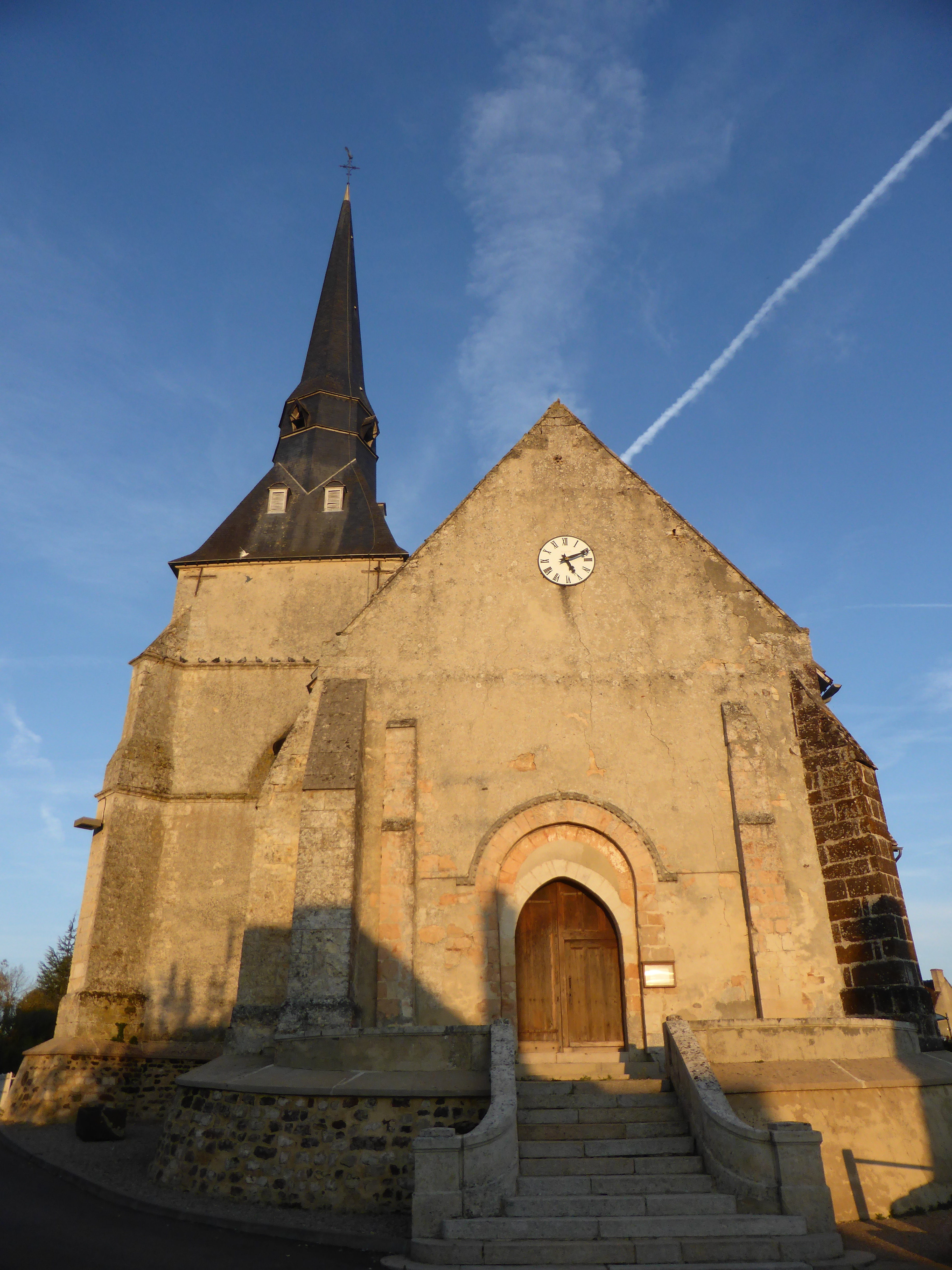 Église Saint-Martin de Suré, dans l'Orne.